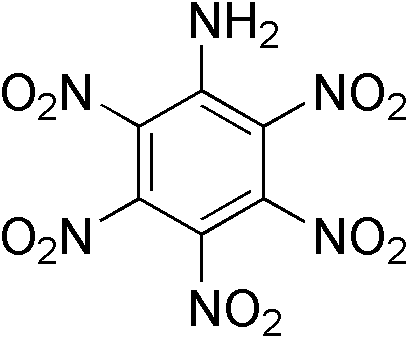 chemical structure of pentanitroaniline